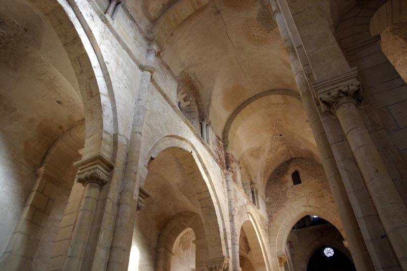 Voûte de la nef principale de l'église de Chateauneuf